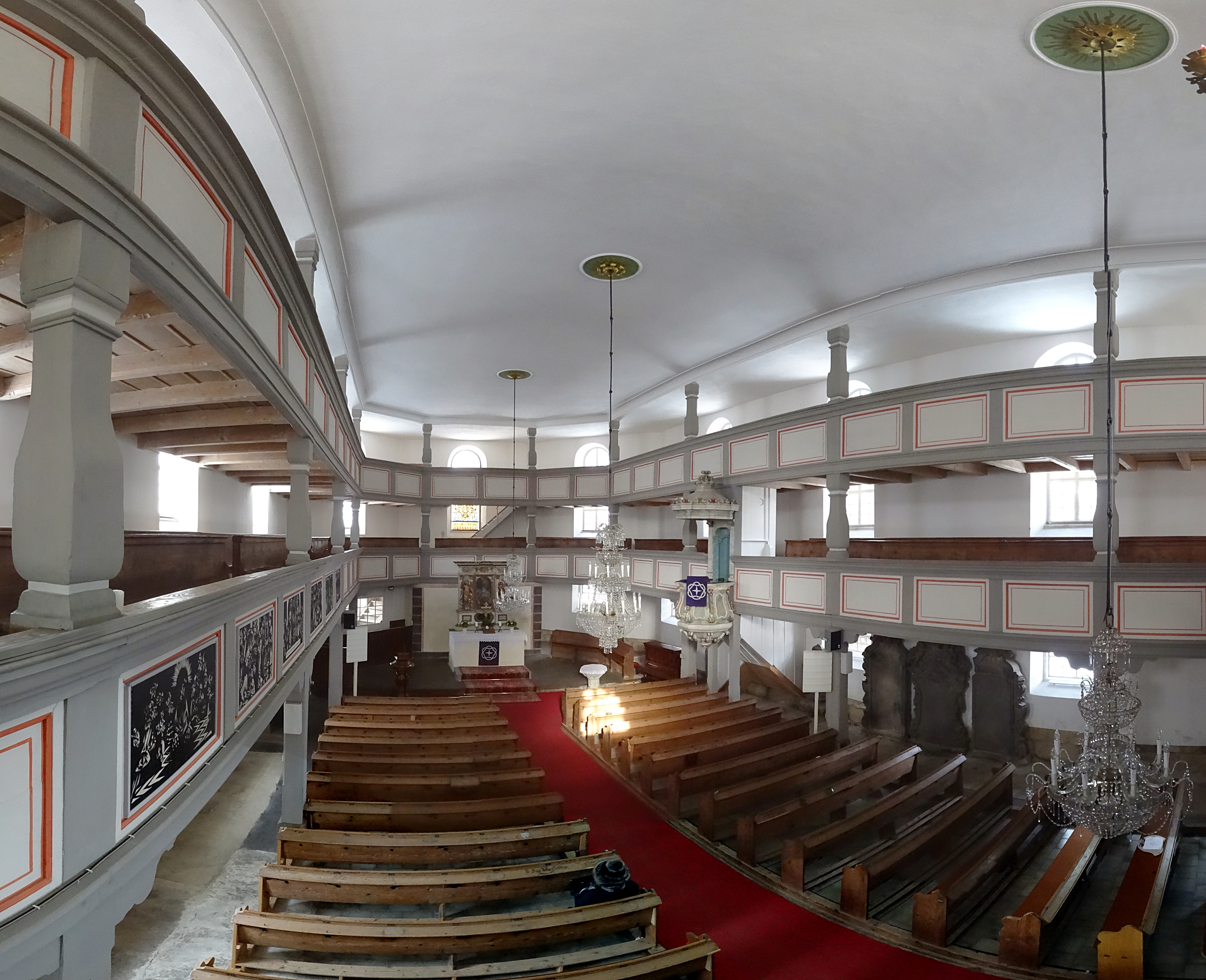 Innenraum Panorama Kirche Jonsdorf